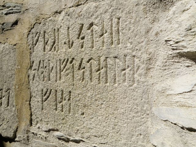 Detail vnitřní výzdoby Bismarckovy rozhledny na Zelené hoře u Chebu.